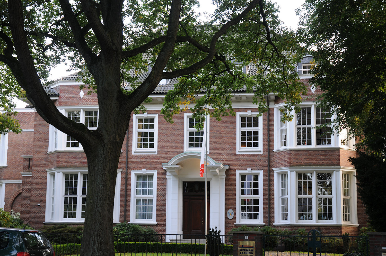 Villa Schütte in Bremen, Marcusallee 9.Das abgebildete Objekt ist ein geschütztes Kulturdenkmal in der Freien Hansestadt Bremen, mit der Nr. 0869 beim Landesamt für Denkmalpflege registriert. Villa Schütte Bremen Marcusallee 9, heute befindet sich in diesem Gebäude die German Lashing Robert Bock Gmbh